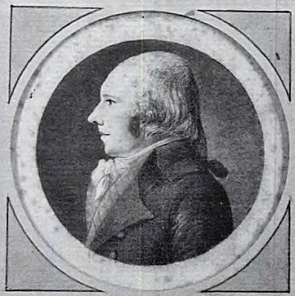 Harmen Jan van der Wyck (1769-1847), holländischer General und Maler